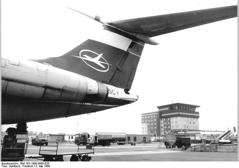 Leipzig, Flughafen, Tower ADN-ZB Gahlbeck 5.5.1988 Leipzig: Messe-Flugverkehr-Während der Messe im Herbst und im Frühjahr werden auf dem Leipziger Flughafen nahezu 20000 Passagiere abgefertigt. Seit diesem Jahr ist das neue siebenstöckige Funktionsgebäude (Hintergrund) in Betrieb und trägt dazu bei, die technischen Möglichkeiten der Flugsicherung und des meteorologischen Dienstes zu erhöhen.